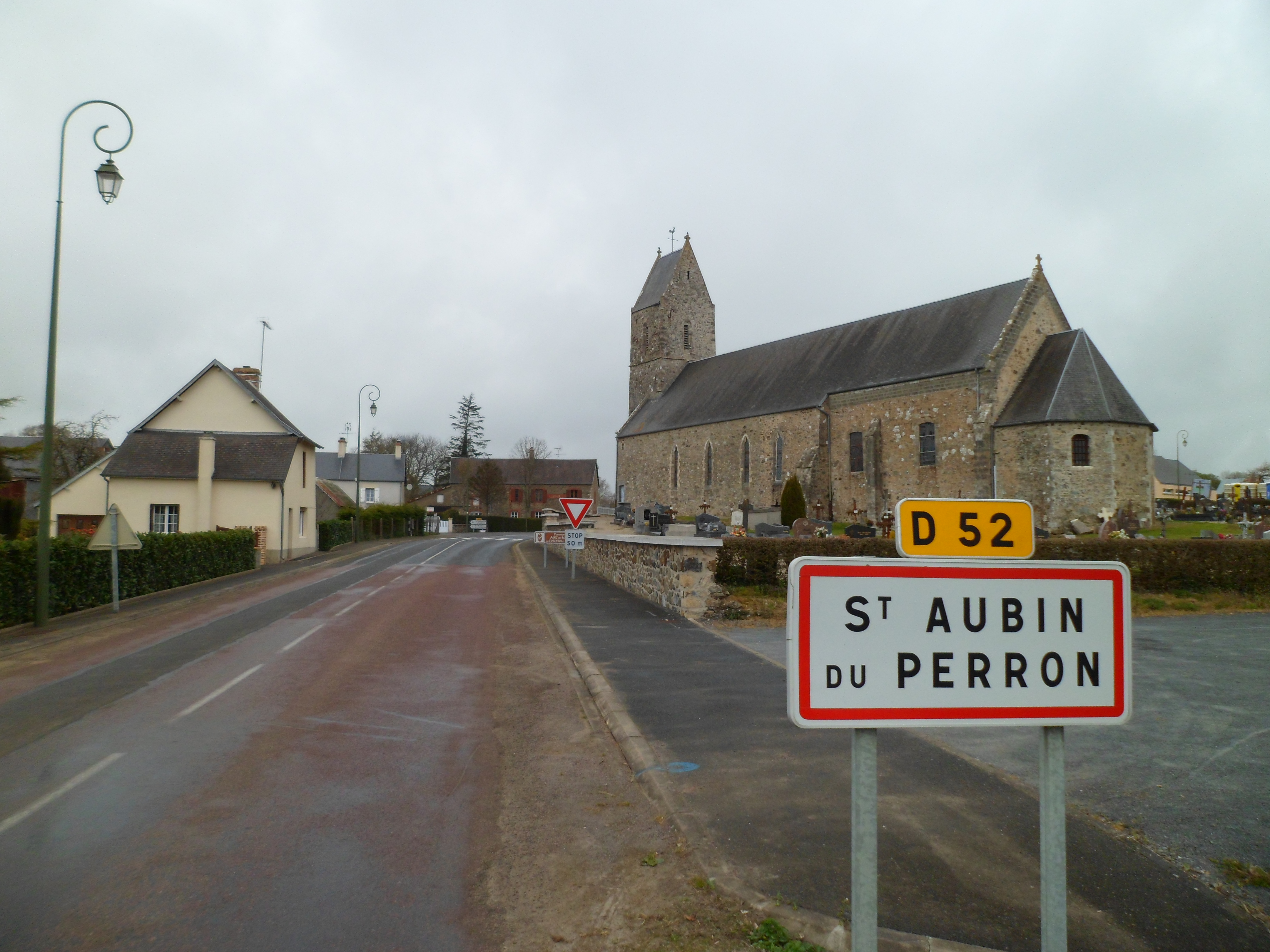 église Saint-Aubin de Saint-Aubin-du-Perron